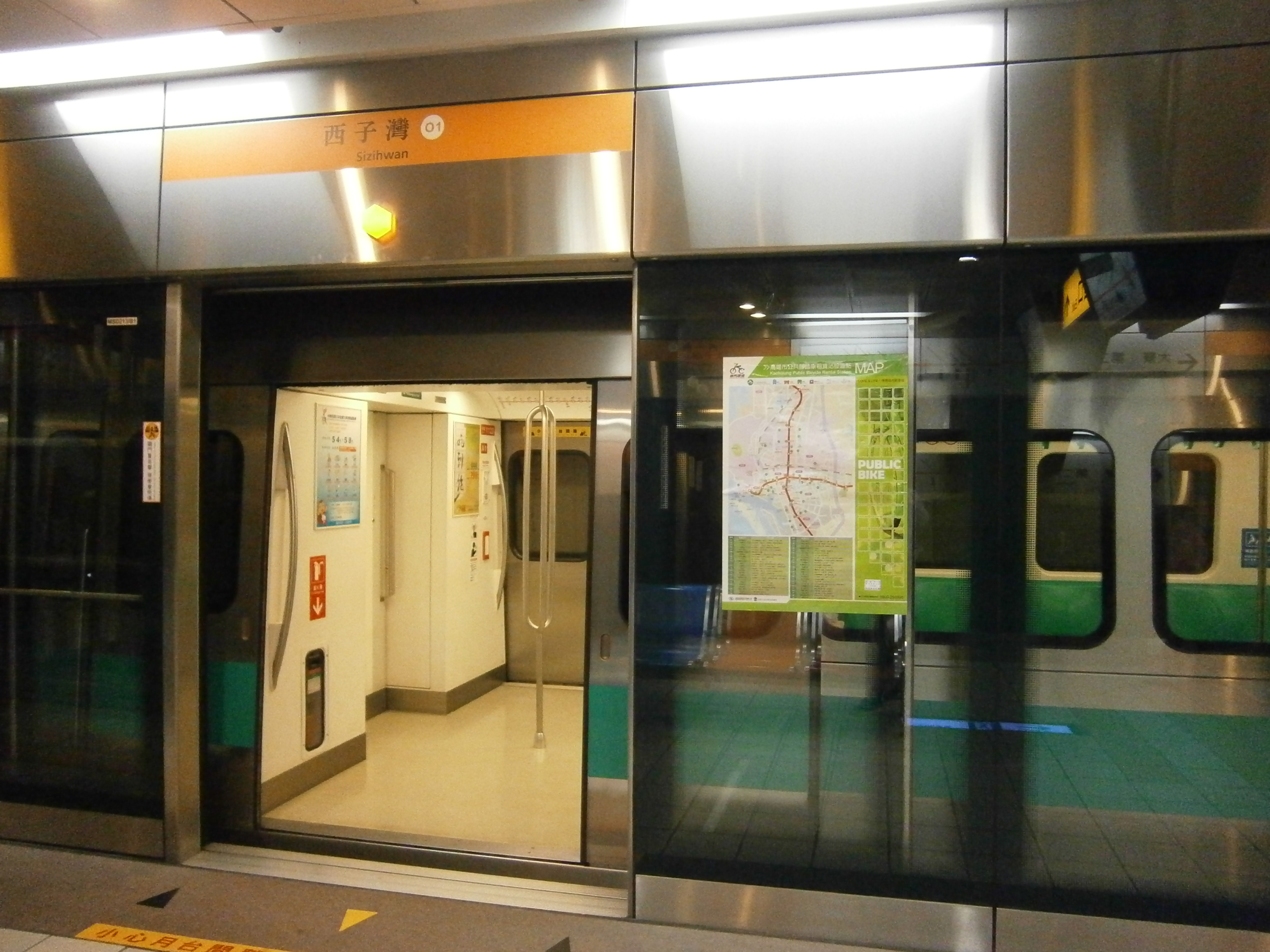 Kaohsiung Metro